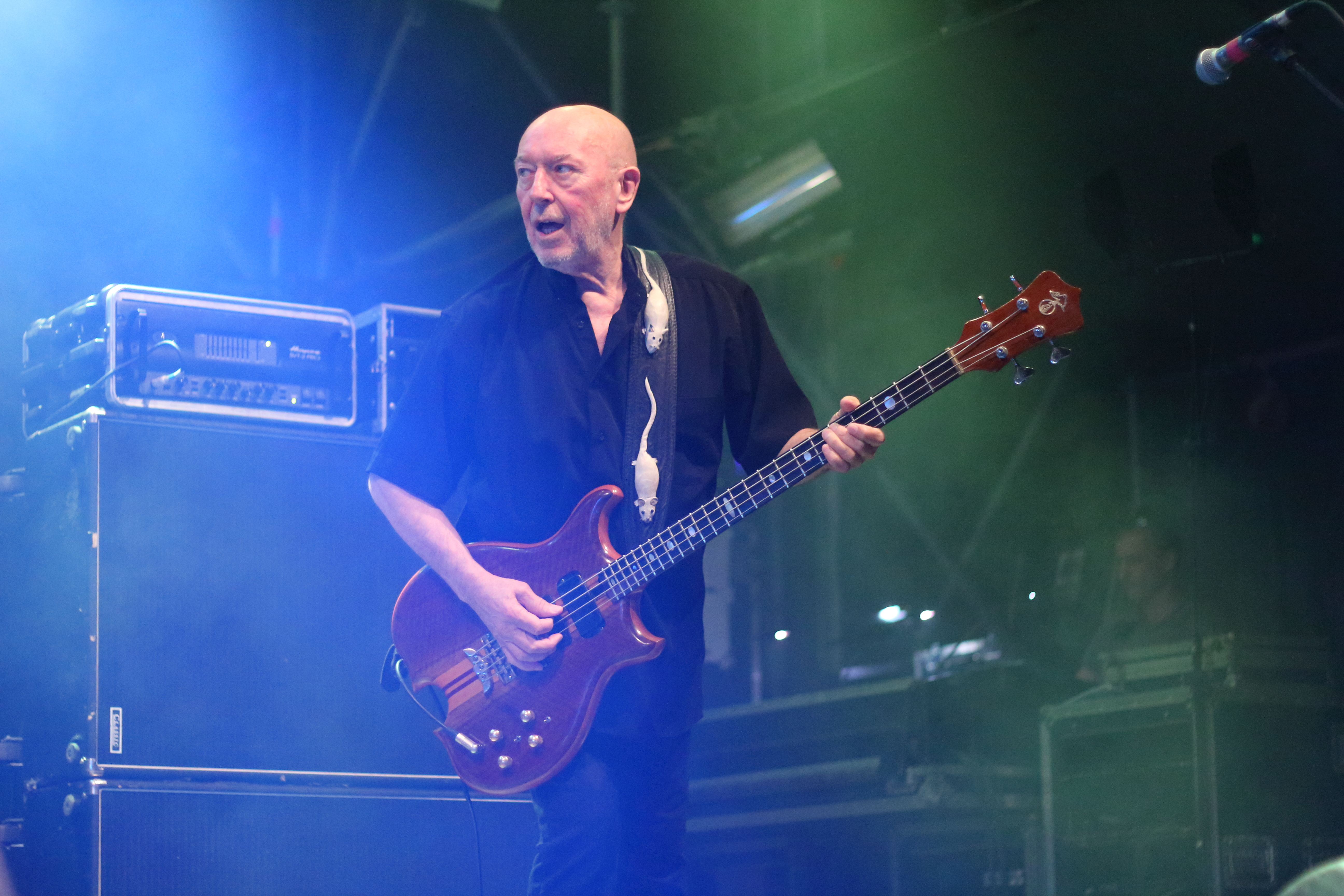 PictureOn 2014